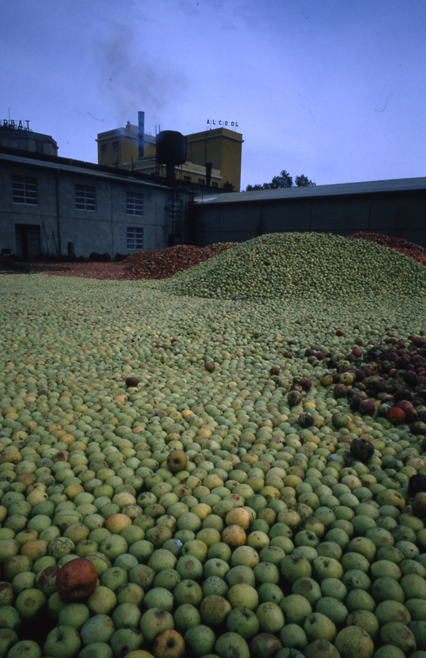 Servizio fotografico : Forlimpopoli, 1966 / Paolo Monti. - Foglio: 1, Fotogrammi complessivi: 9/20 : Diapositiva, sviluppo cromogeno/ pellicola ; 35 mm. - ((All'interno della scatola contenente i fogli di diapositive nn. 481-495 ritagli di stampa fotografica con iscrizioni manoscritte a pennarello nero sul verso: "Fiori Az/ Leica Elmar - 60/ Forlimpo/poli - mele". - Le diapositive nn. 01-10 e 20 costituiscono un'altra serie. - Confronta con negativi b/n (gelatina bromuro d'argento/ pellicola - 35mm): 0334L66-75. - Fonte: Rubrica di Paolo Monti: Diapositive 24x36mm (1948-1982), presso Archivio Paolo Monti. Rubrica con elenco soggetti e numeri di inventario (da 1 a 1000) corrispondenti ai fogli a tasche in pvc in cui sono contenute le diapositive. - Fonte: Agenda di Paolo Monti: Monti/ 3 aprile 1966 - 9 marzo 1971/ 12421-16823 (1966-1971), presso Archivio Paolo Monti. Agenda al giorno con soggetti nel formato 9x12-18x24. Segnalati da Monti quelli realizzati in 6x6.